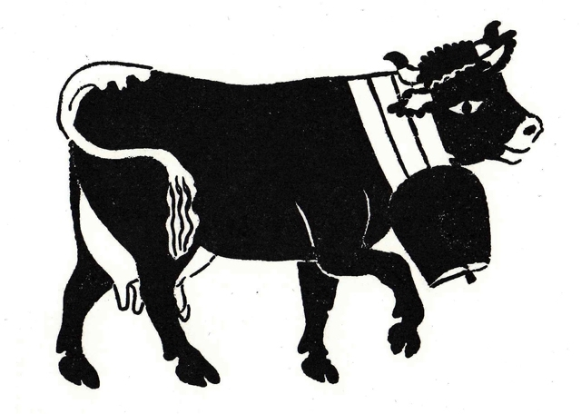 Mit Druckstock hergestellte «Lämmlerkuh» des Appenzeller Senntumsmalers Bartholomäus Lämmler (1809–1865)